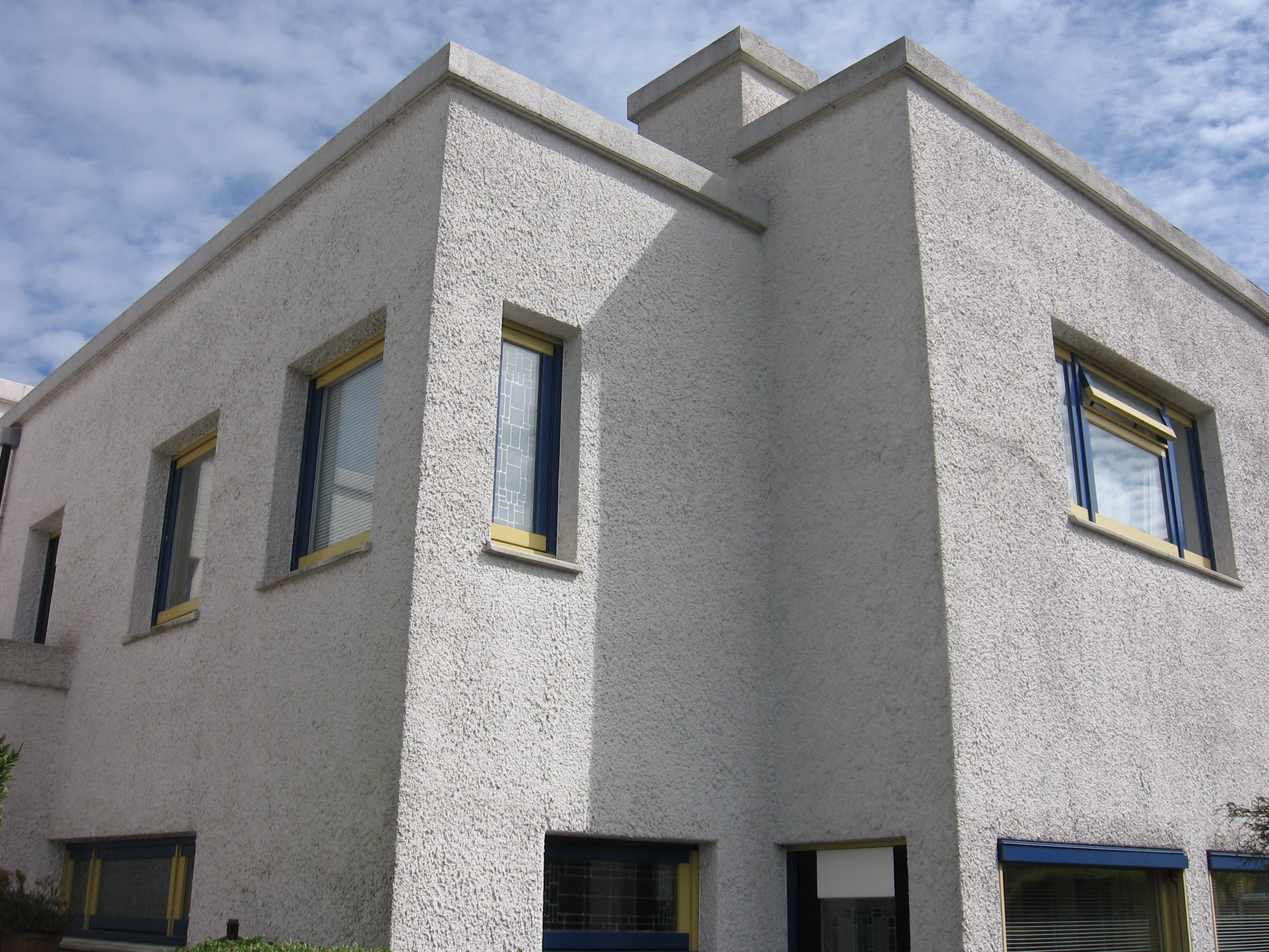 Papaverhof, Den Haag, mei 2007